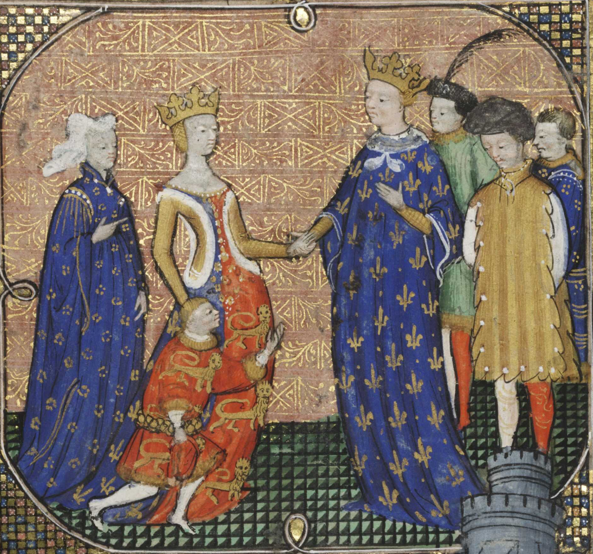 Charles IV le Bel accueillant Isabelle de France